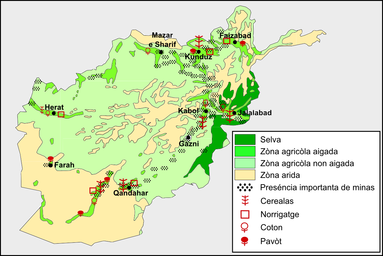 Esquèma generau de l'agricultura d'Afganistan.